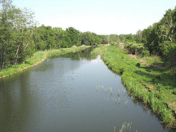 Alter Rhin bei Linumhorst